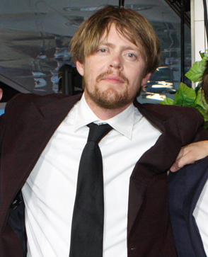 A Few Best Men Red Carpet Movie Premiere In Sydney, Australia